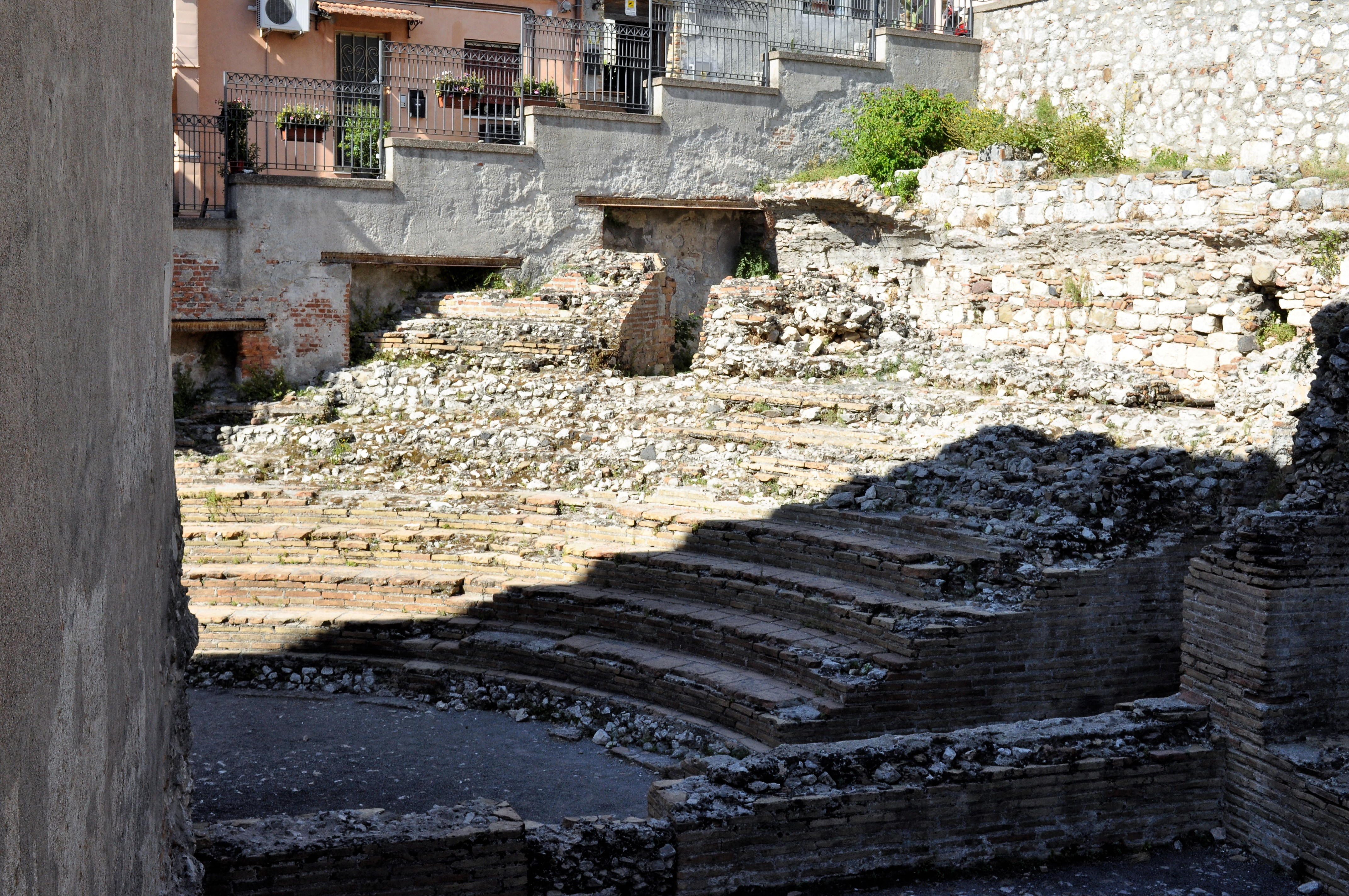 L'odeon romano di Taormina con il pavimento recentemente ricostruito